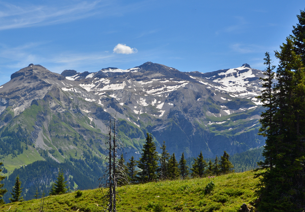 Das Weisshorn oberhalb Lenk (Mitte)